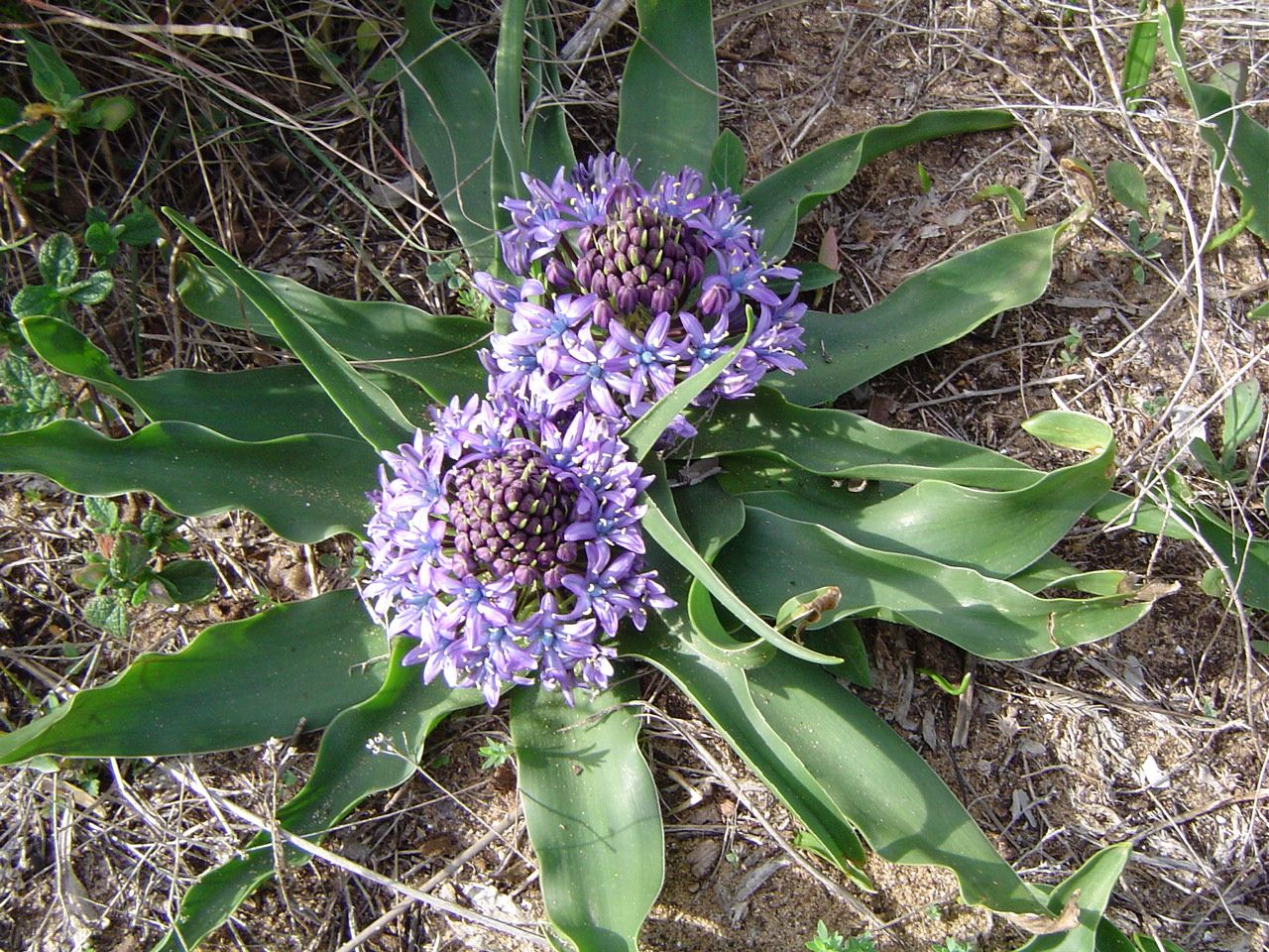 Scilla peruviana L., flor de la corona, flor de la piña, jacinto azul estrellado, jacinto portugués, mosquera sevillana. A pesar de su nombre botánico no es una planta del Perú. Fotografía tomada en la costa de Cádiz, España.